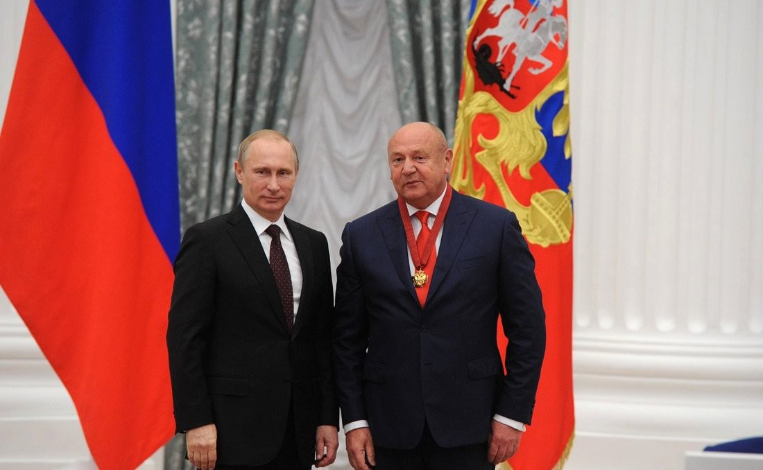 Вручение государственных наград Российской Федерации. Орденом «За заслуги перед Отечеством» III степени награждён директор ФГБУ «Научный центр акушерства, гинекологии и перинатологии имени академика В.И.Кулакова» Геннадий Сухих.